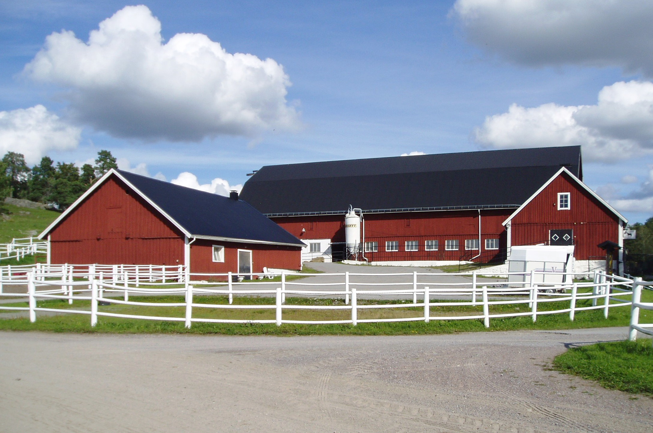 Erikssunds säteri, ekonomibyggnader